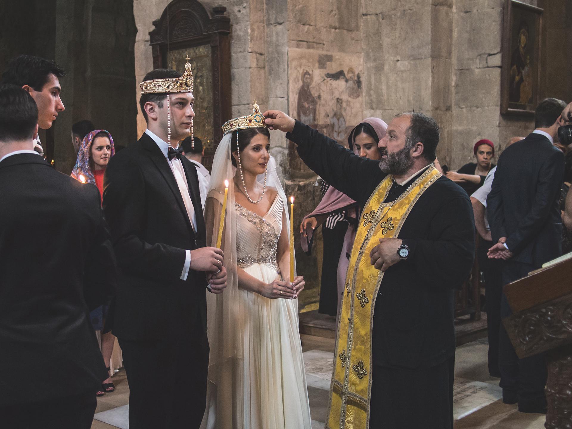 A Georgian Wedding